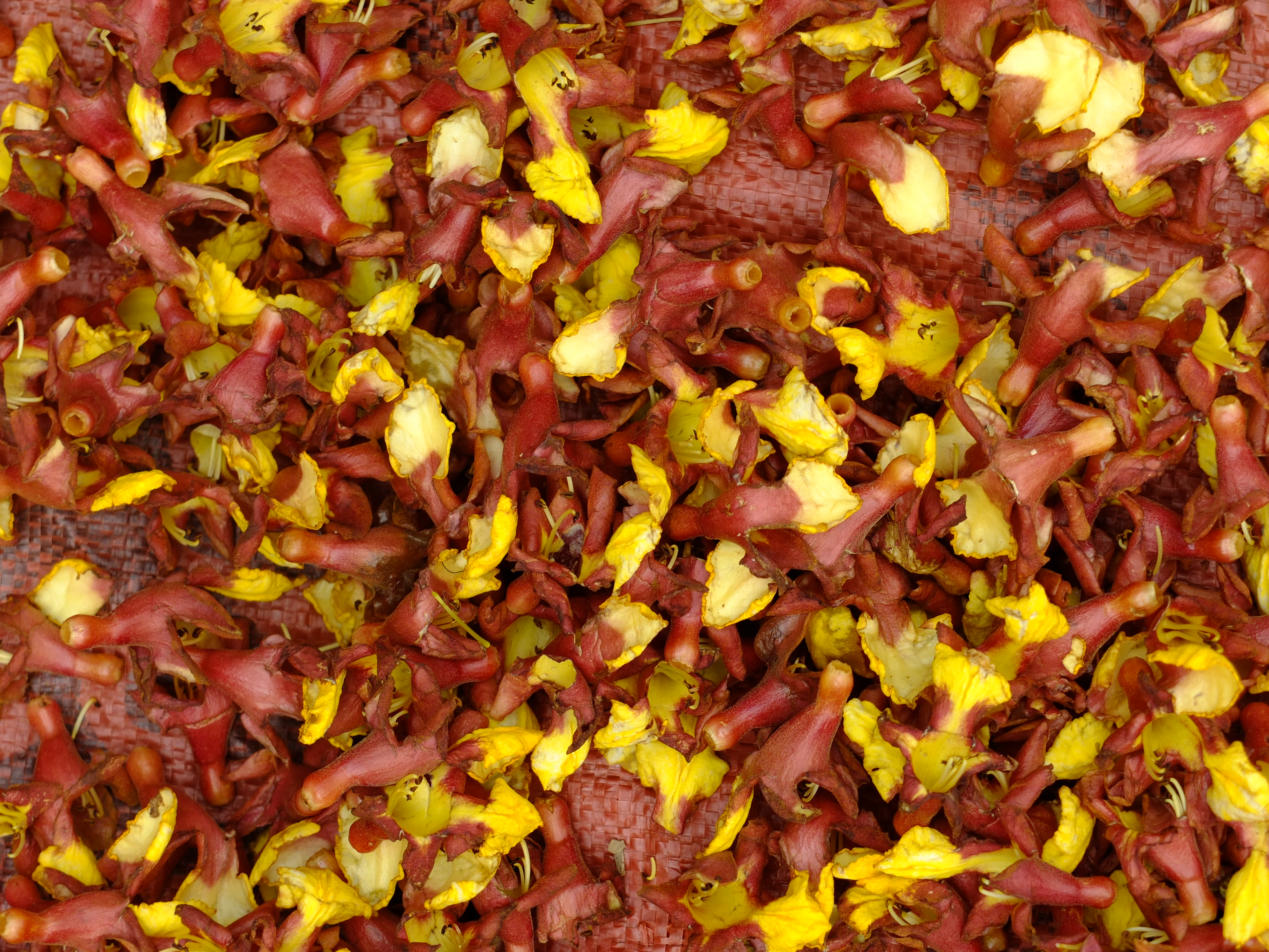 fleurs vendues au marché de Luang Prabang Laos